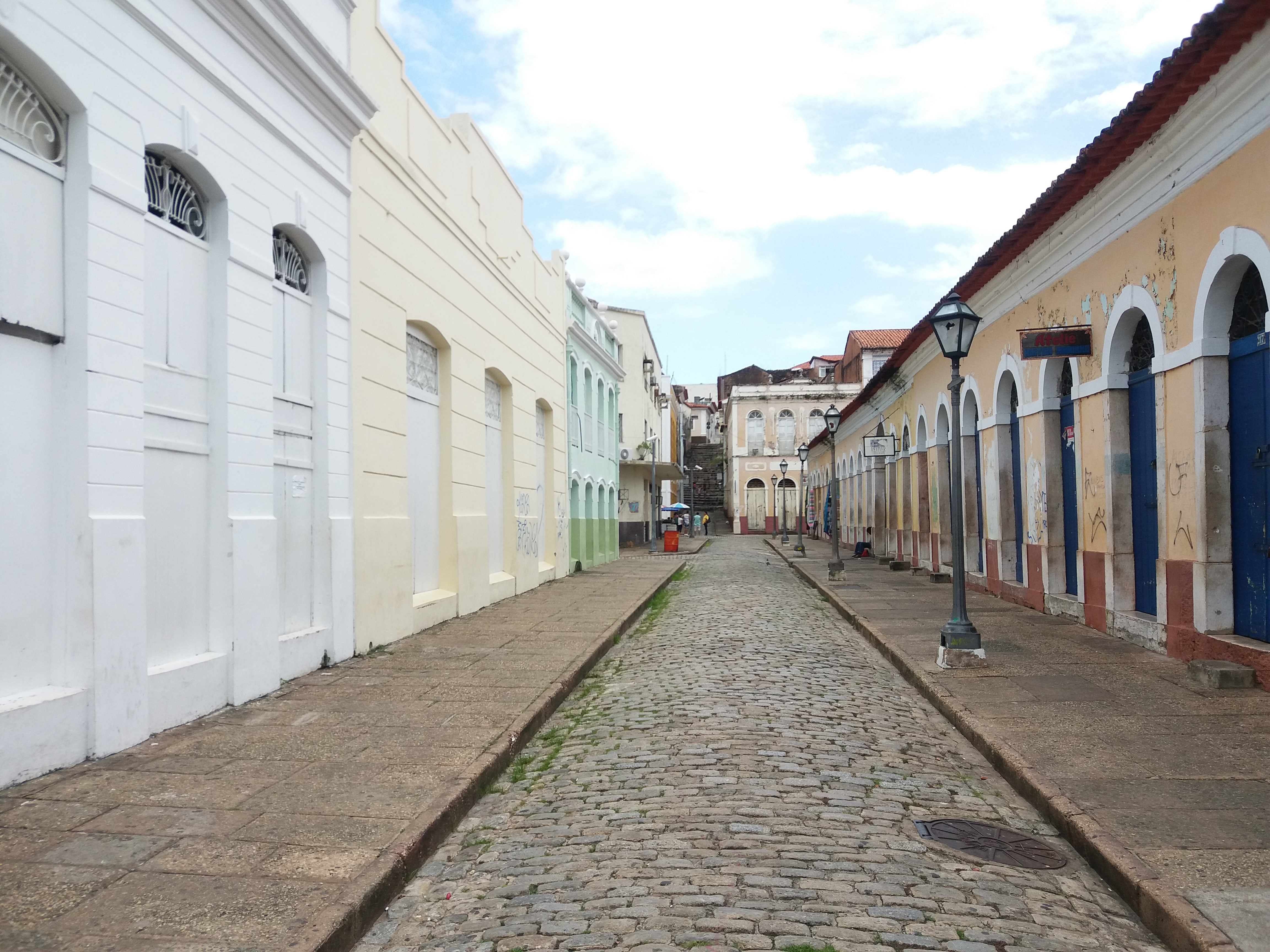 sao luiz maranhao brasil